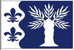 vjaka obce Milotice nad Bečvou